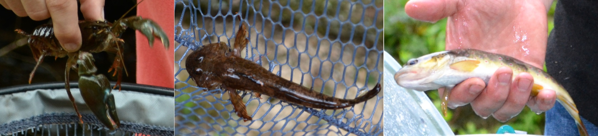 Spécimens pêchés en juillet 2013 au lieu dit Le Bas (Fresse)